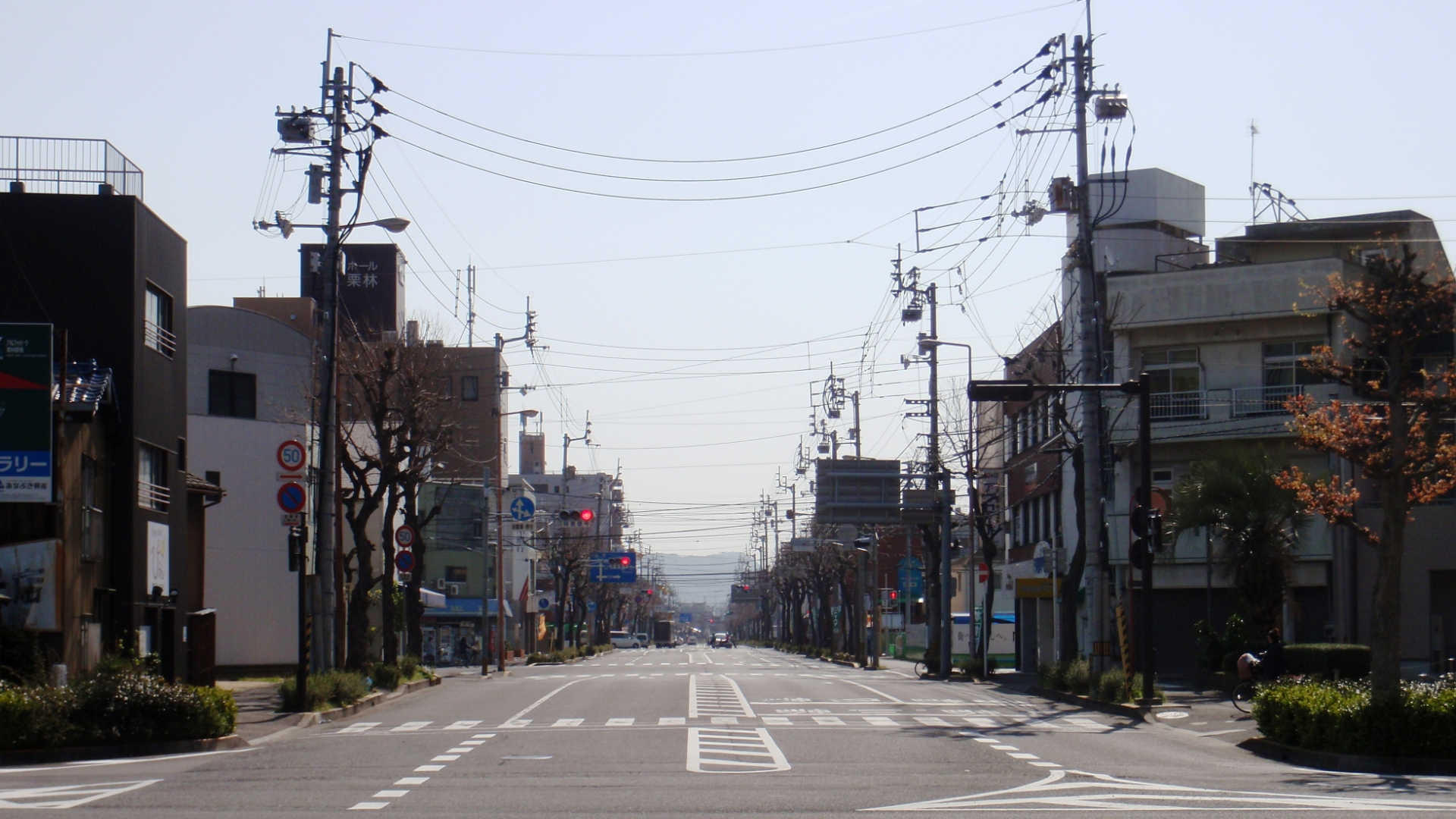 香川県高松市の市道花ノ宮木太線の風景。起点の栗林公園南交差点から望む。